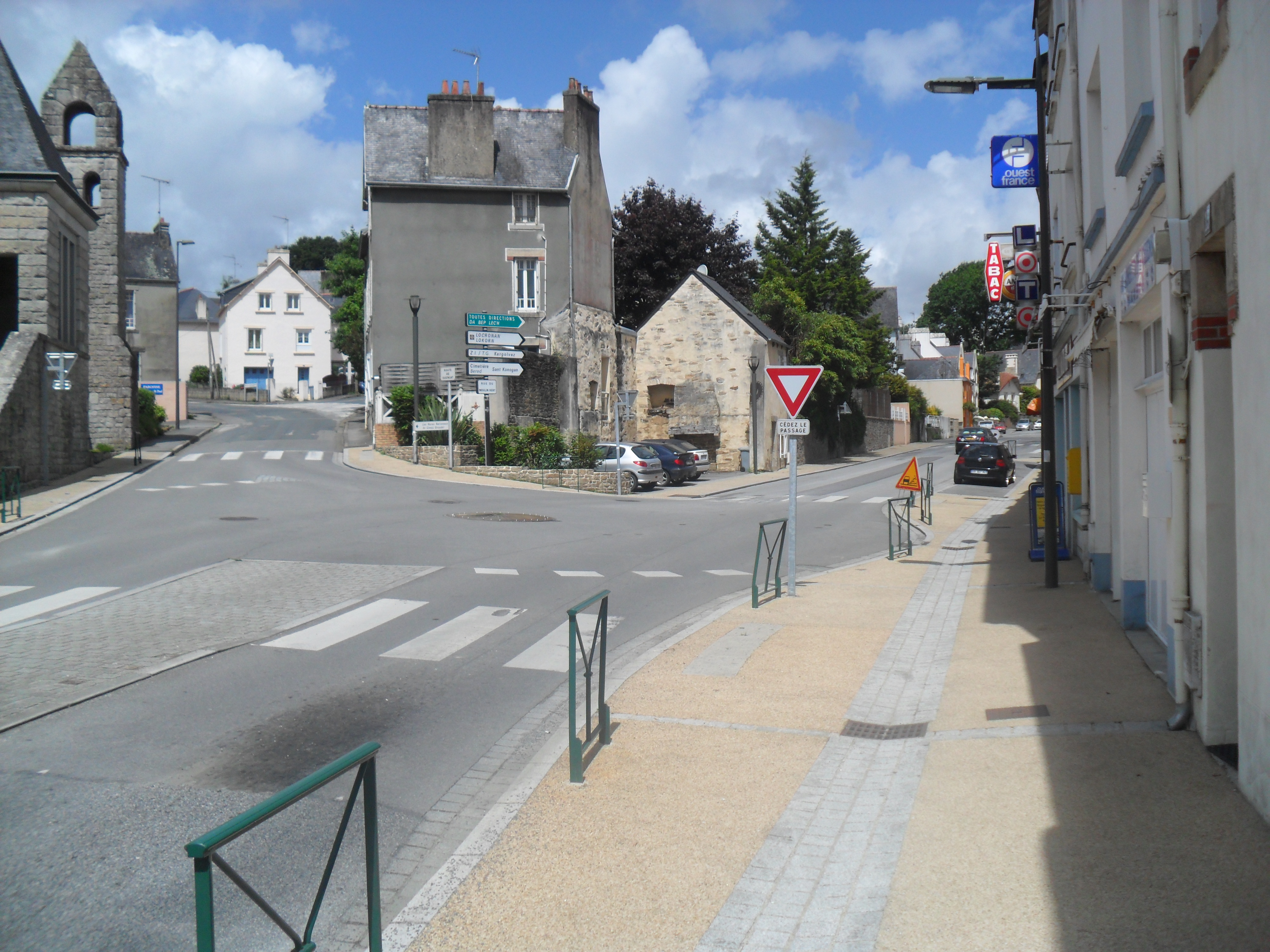 Quartier du Moulin Vert à Quimper (France)